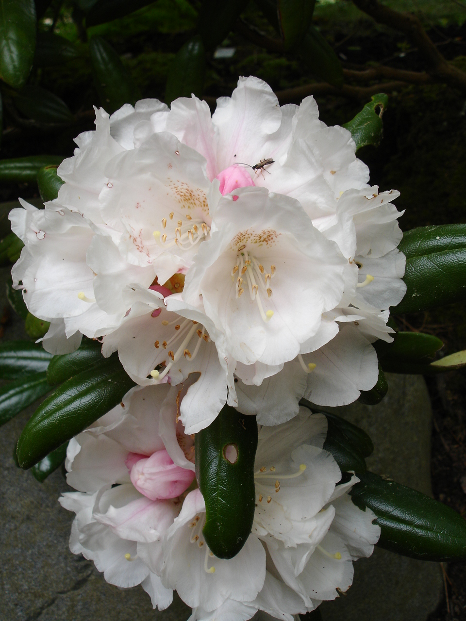 Rhododendron degronianum subsp. yakushimanum var. yakushimanum